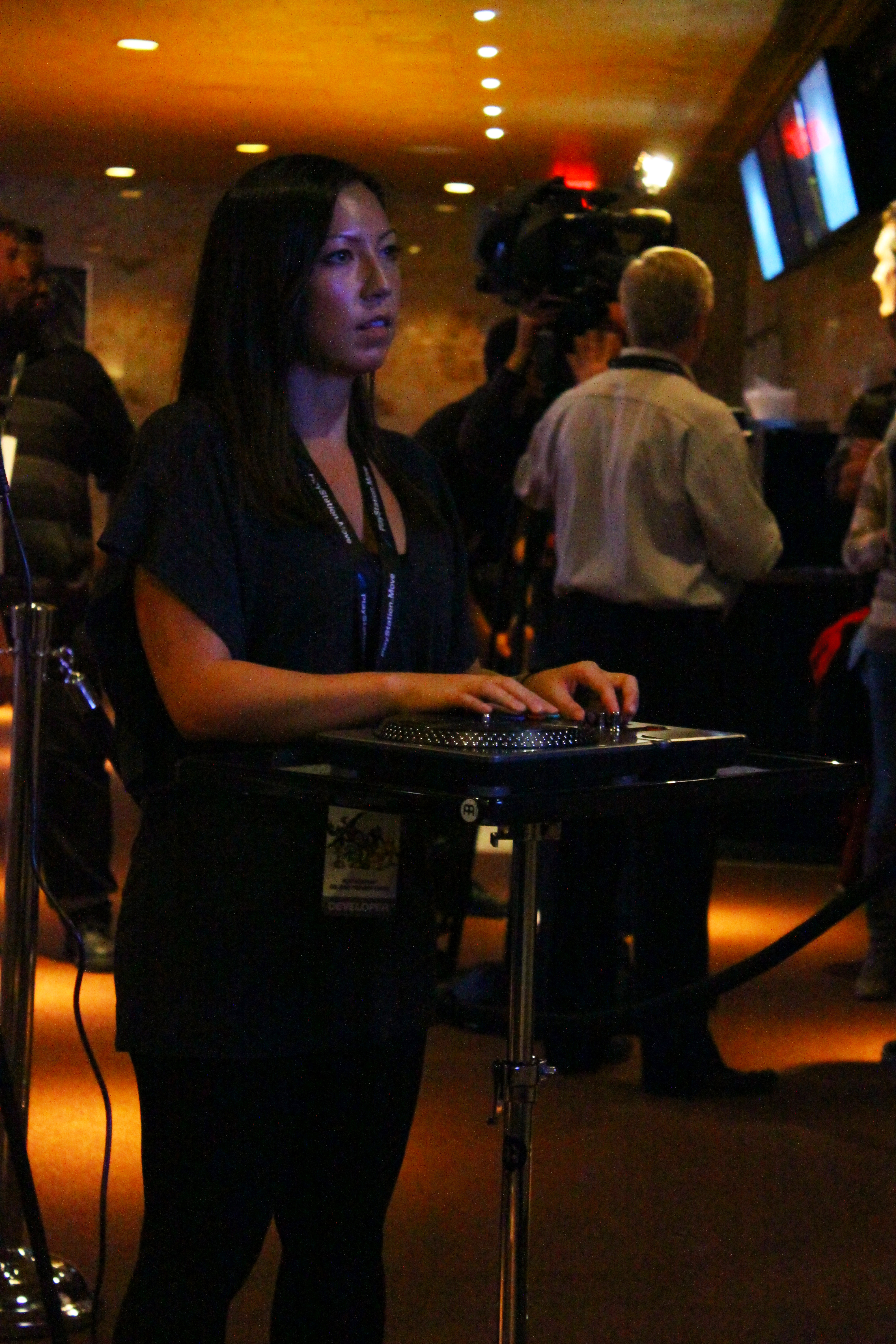 DJ Hero 2